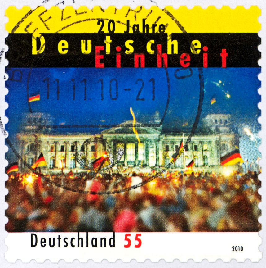 Sonderbriefmarke 20 Jahre Deutsch Einheit